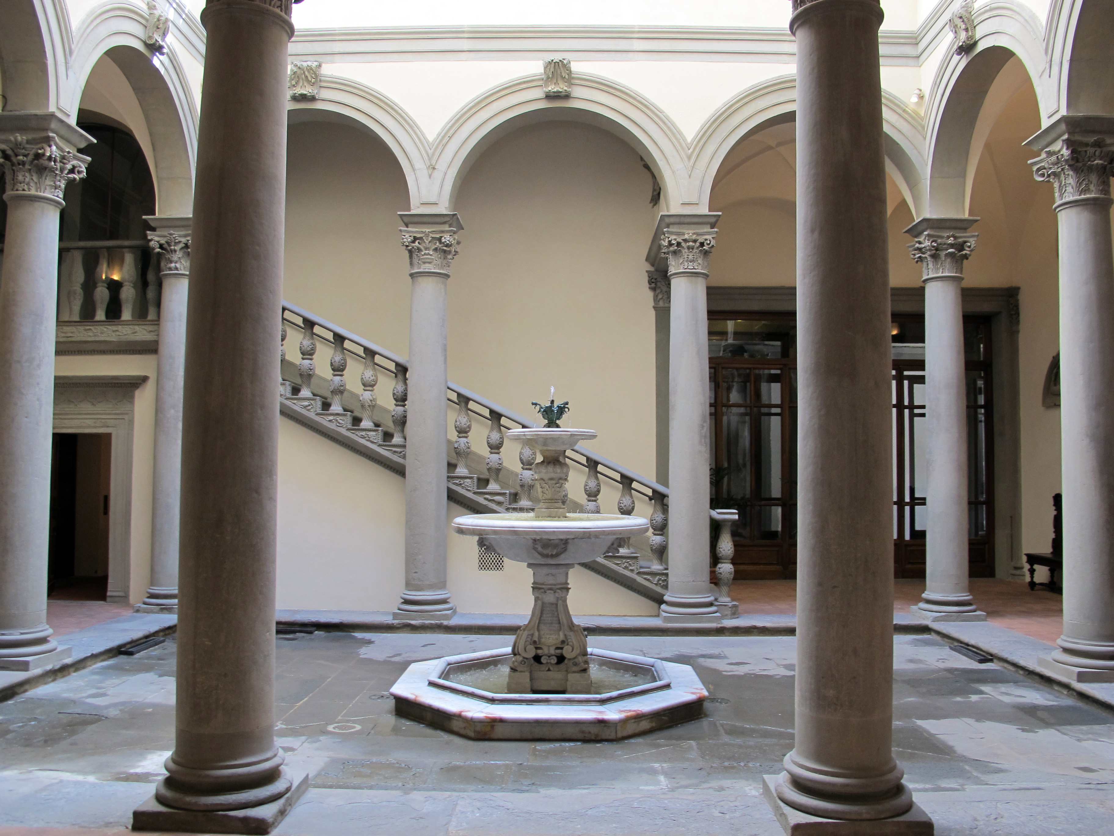 Palazzo gondi, cortile di giuliano da sangallo